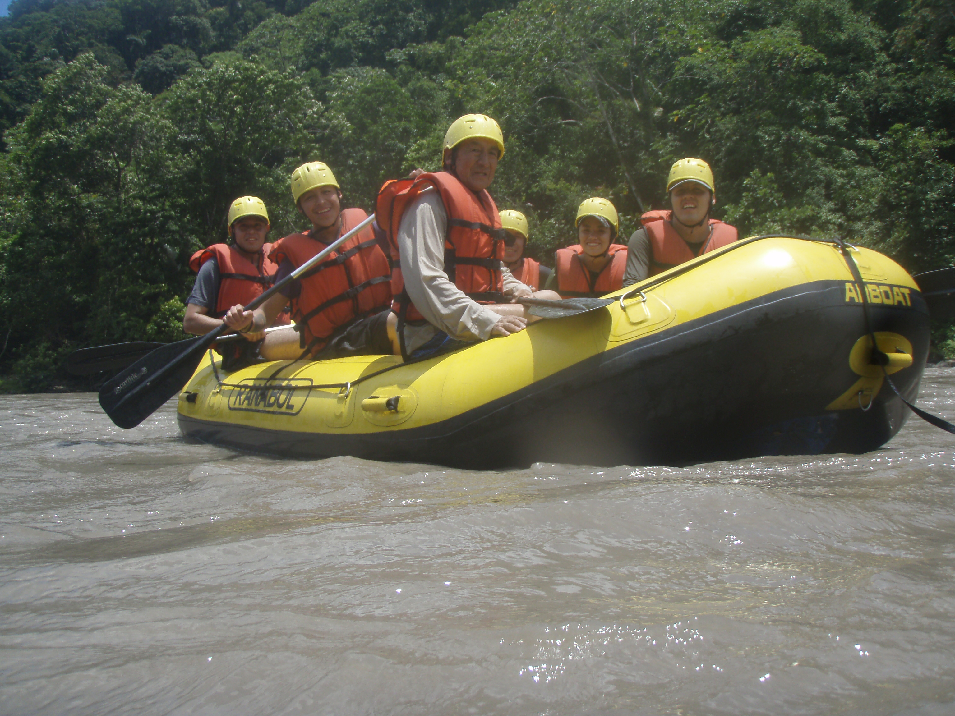 Foto de actividades turísticas de villa Tunari